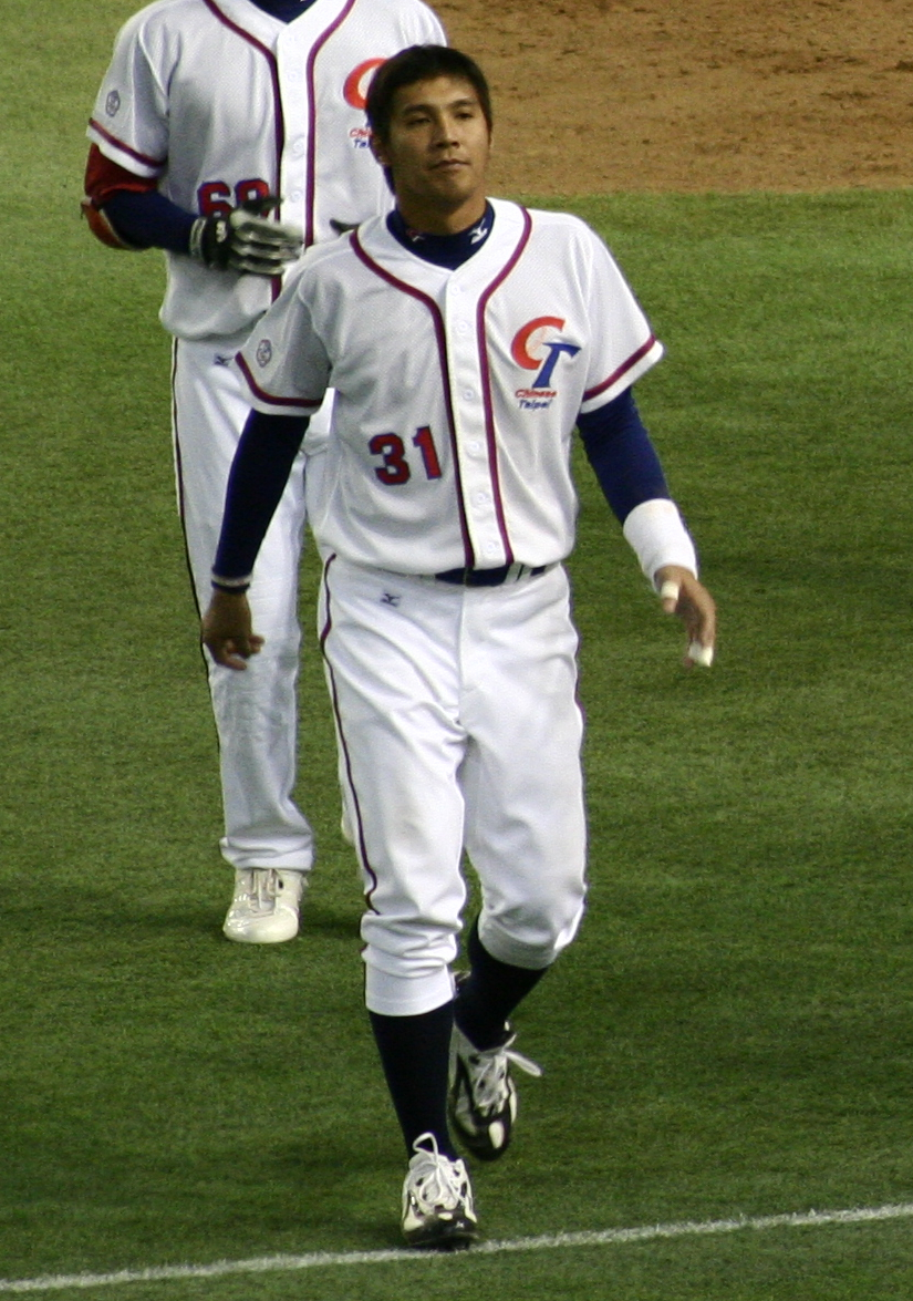 鄭昌明